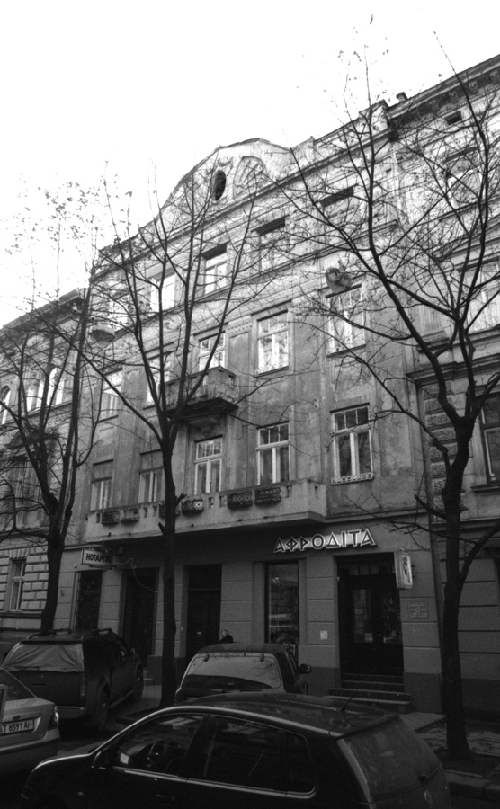 Львов, улица Богдана Лепкого 4, дом где жил Станислав Лем